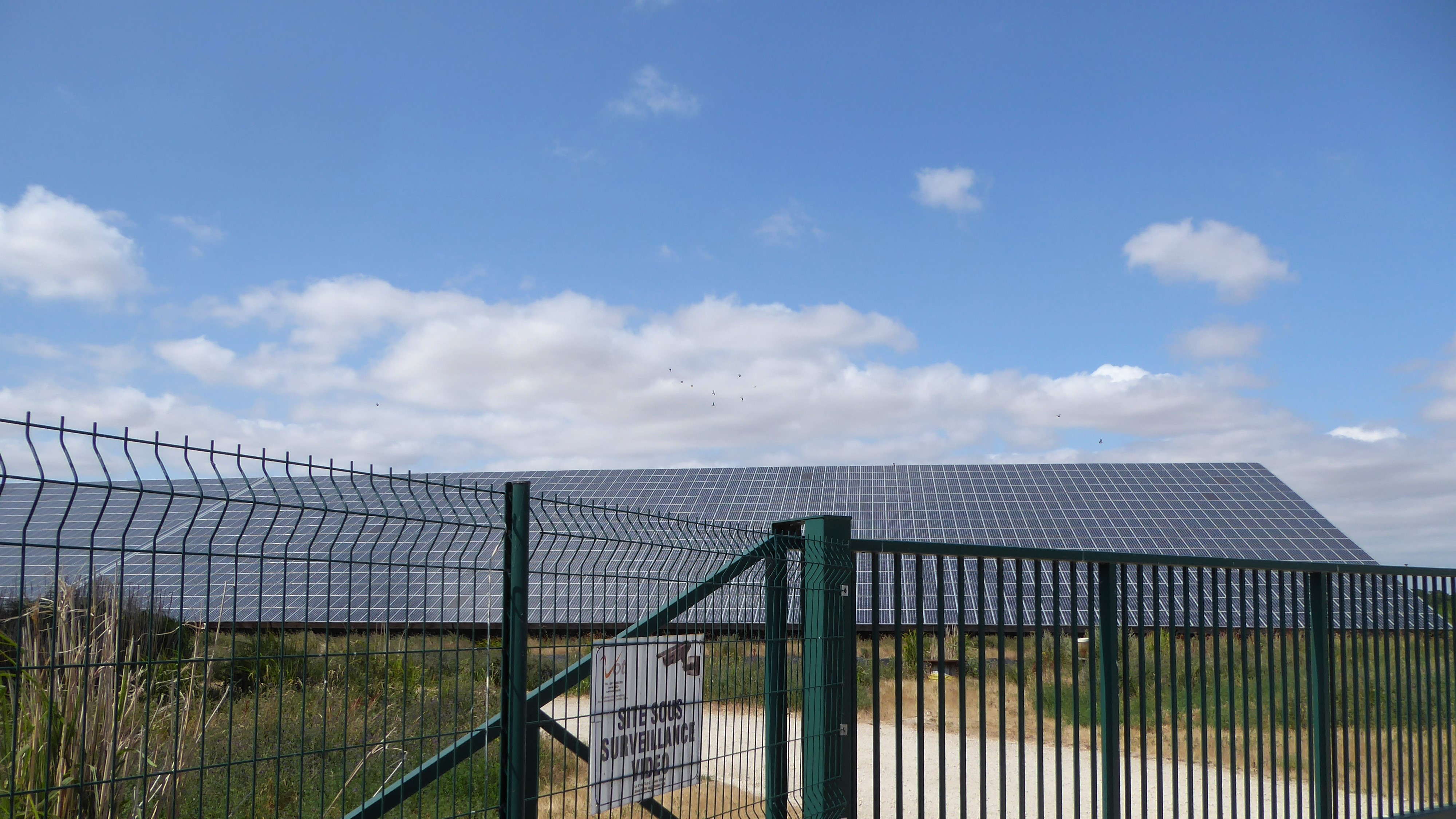 panneaux solaires à Morainville, sur la route de Mondonville-Saint-Jean à Léthuin, Eure-et-Loir, France.